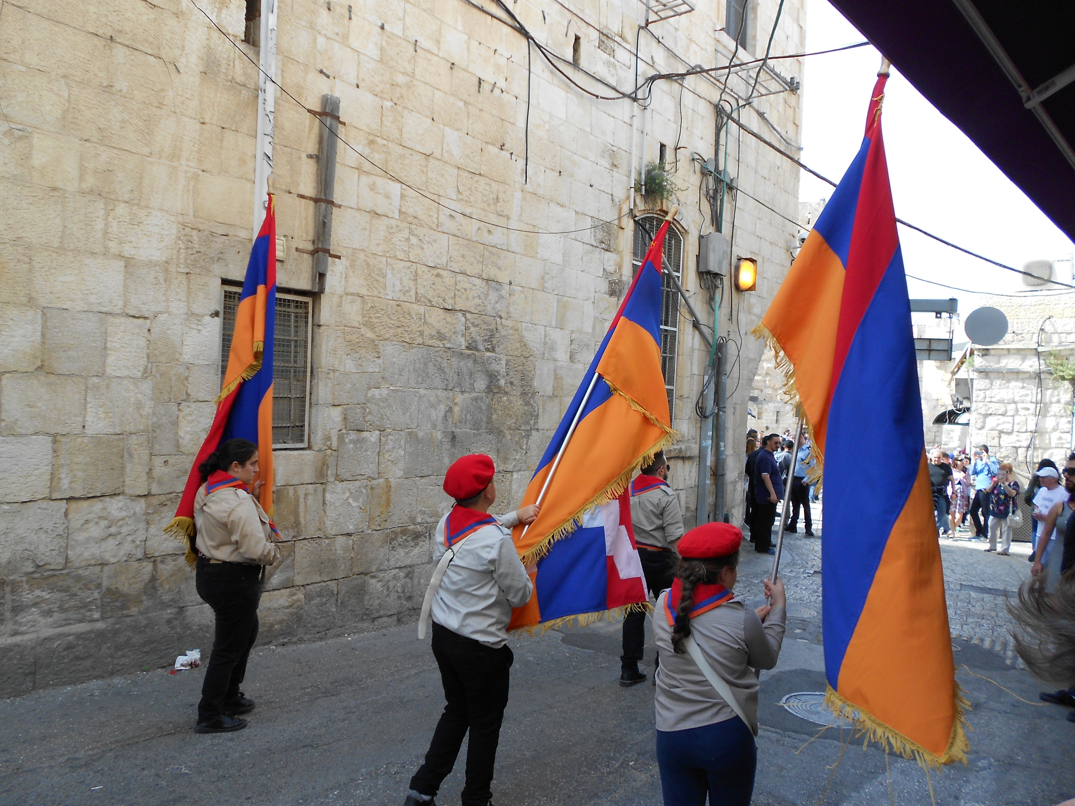 Armenian parade in Jerusalem 2018-04-07